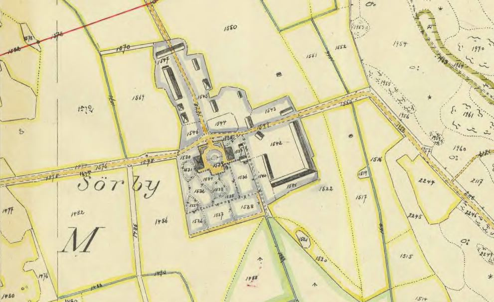 Karta över Sörbys huvudbebyggelse